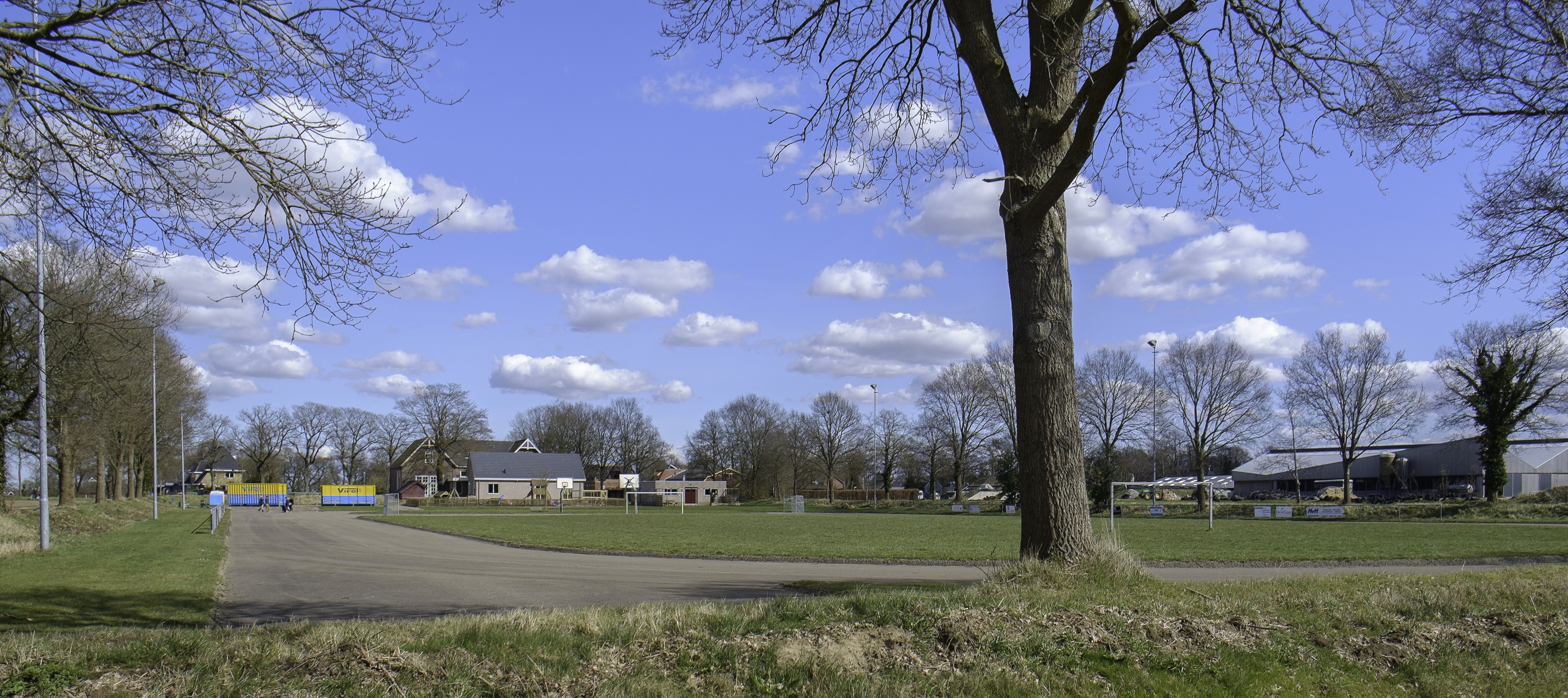 Skeelerbaan en ijsbaan van Noordlaren